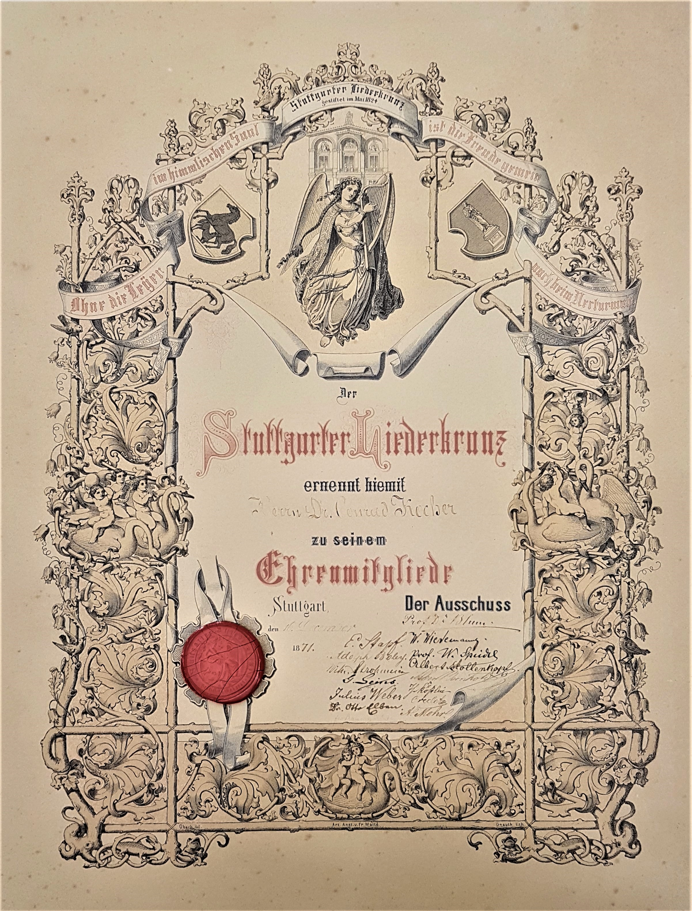 Urkunde zur Ernennung Konrad Kochers zum Ehrenmitglied des Stuttgarter Liederkranzes